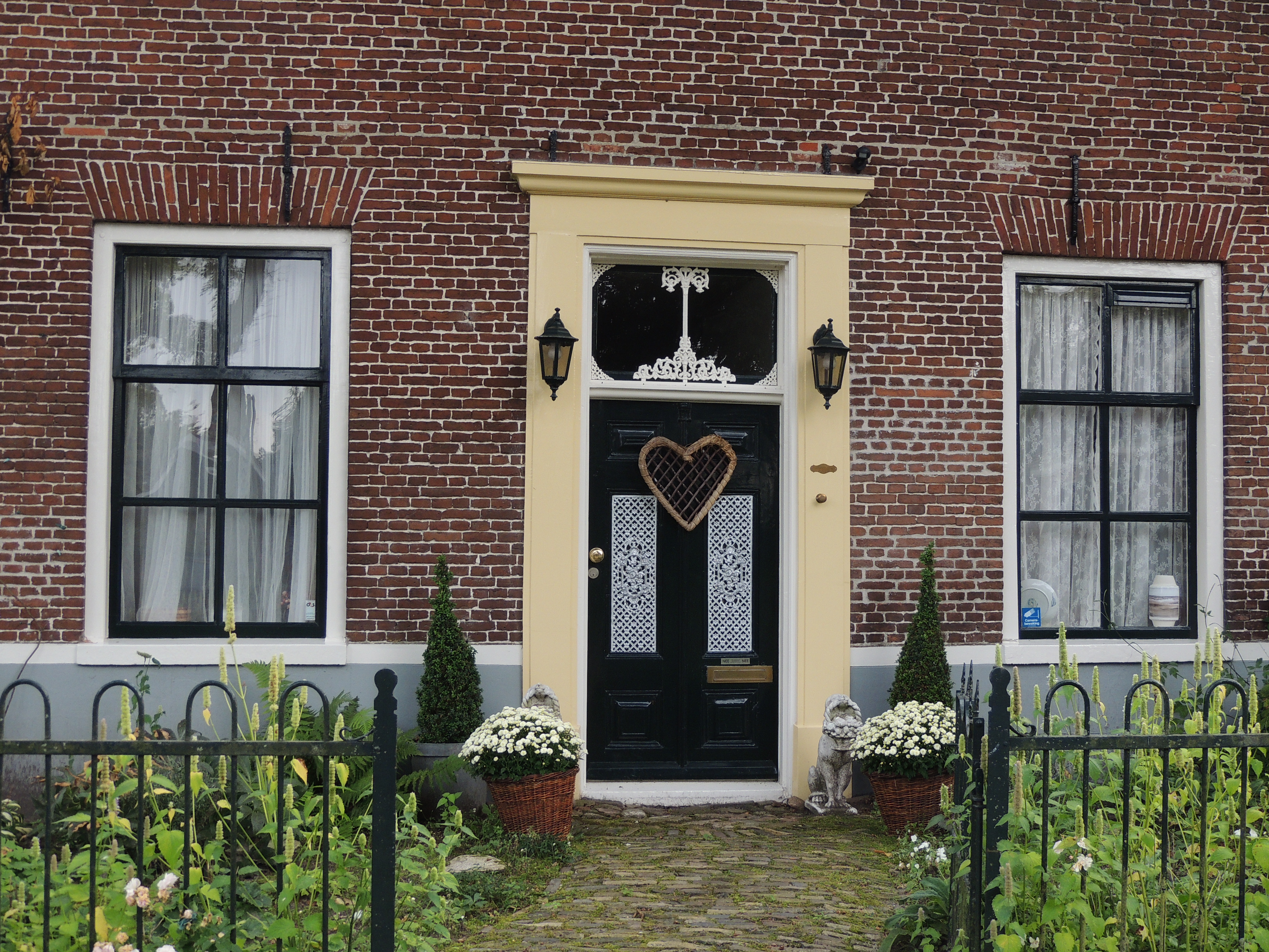 Detail Kerkstraat 2 Gasselte